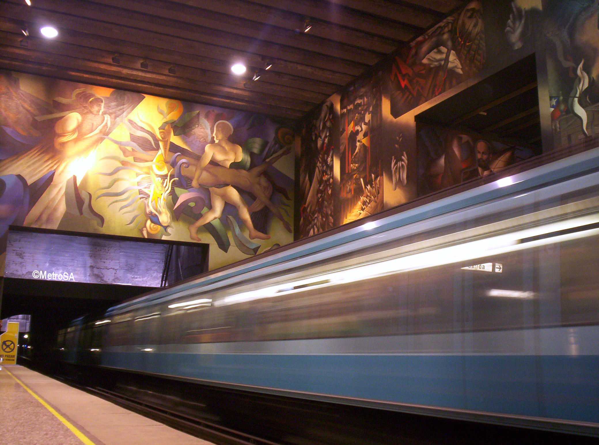 Mural de Toral en metro estacion Universidad de Chile, por User:Auztrel.